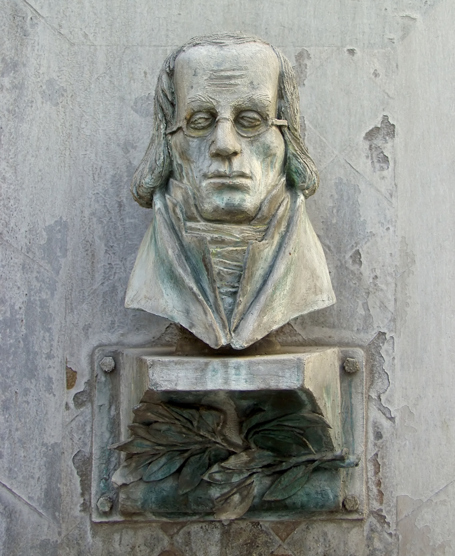 Büste von Marcus DuMont am DuMont-Brunnen